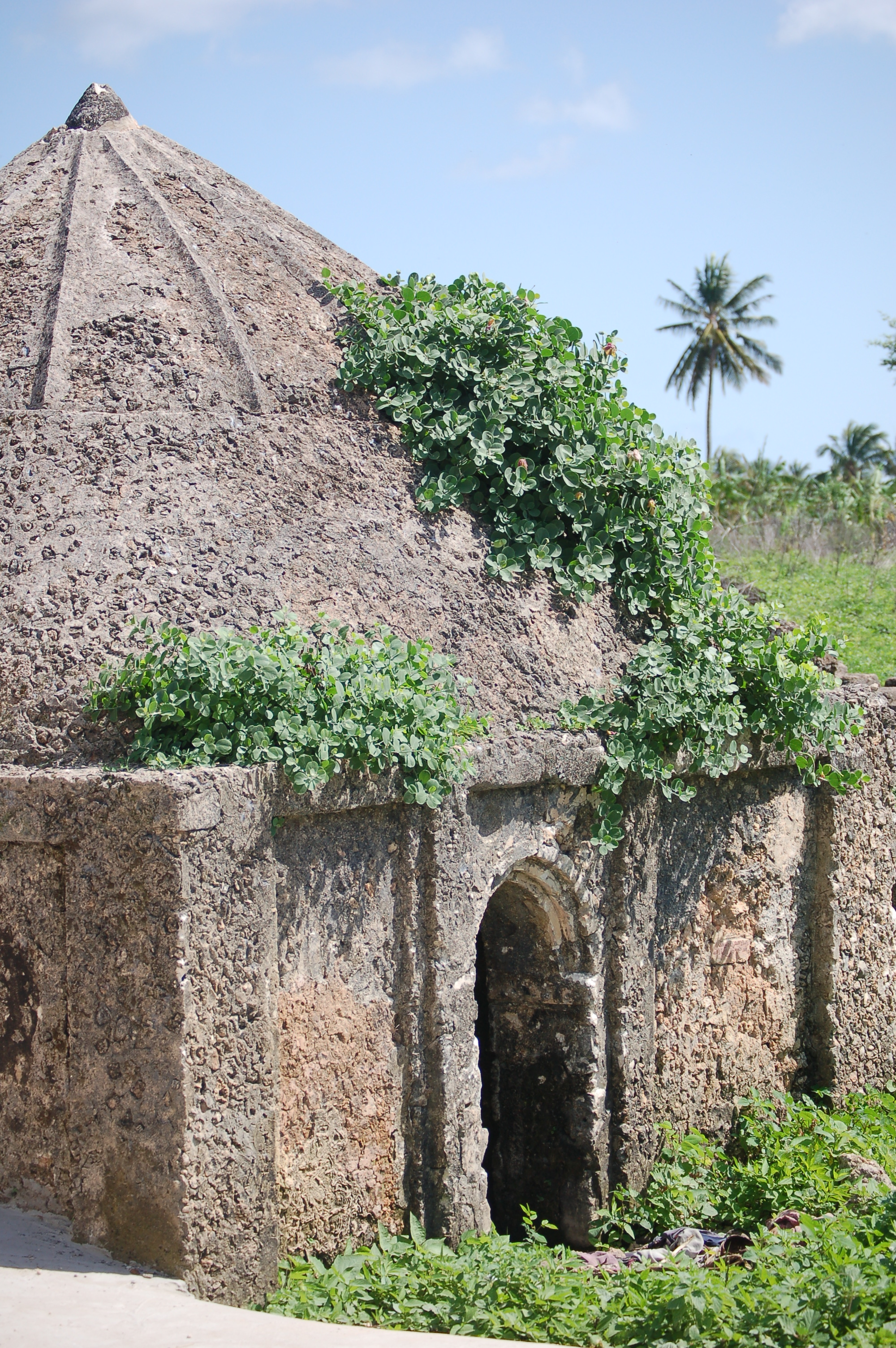 Pate Island, Kenya